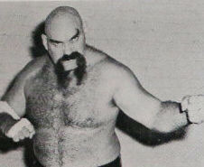 Skip Young dans le programme de catch Big Time Wrestling du 12 juillet 1977